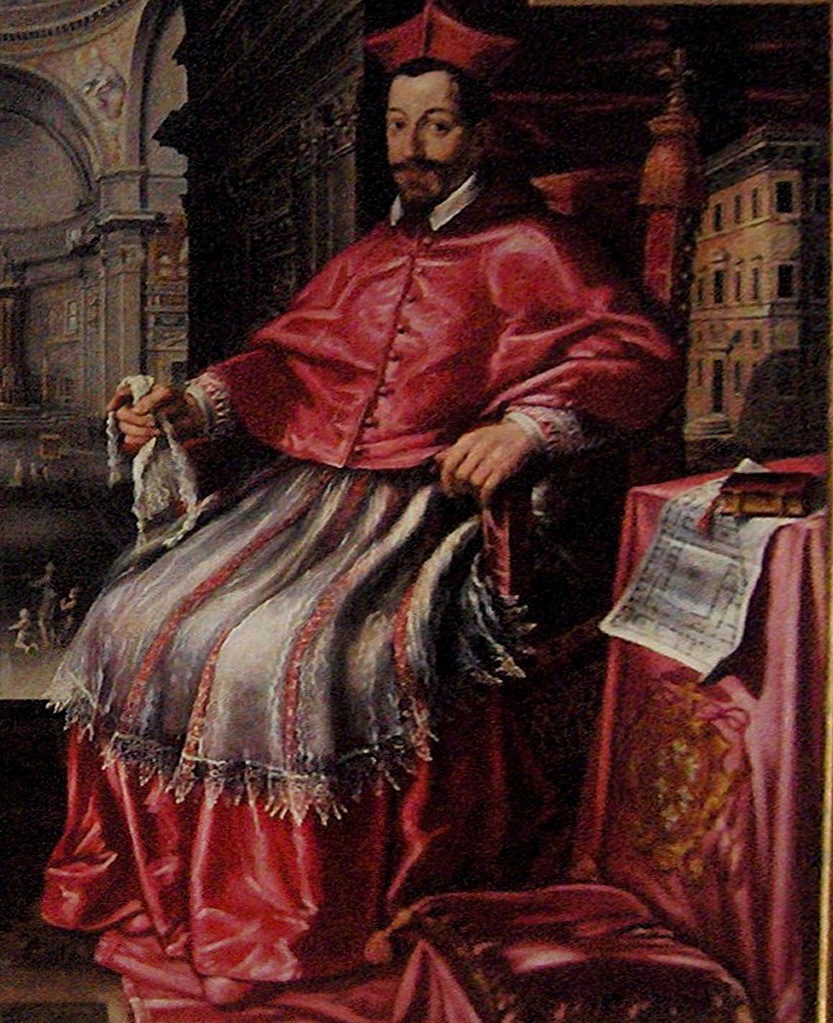 Cardeal Odoardo Farnese (1573-1626), na obra "Cardeais Alessandro Farnese e Odoardo Farnese"